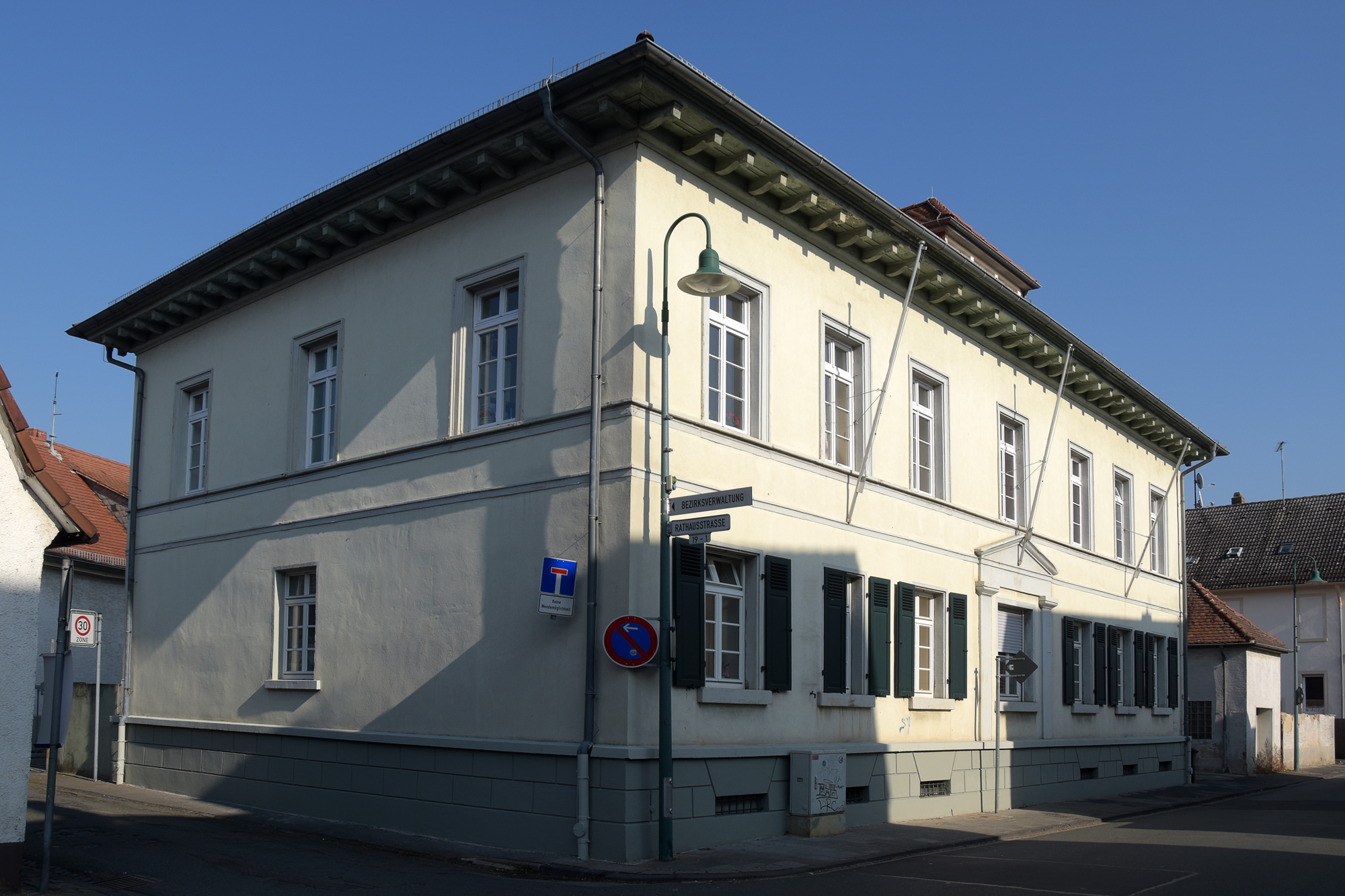 Denkmalgeschütztes altes Rathaus in Darmstadt-Arheilgen